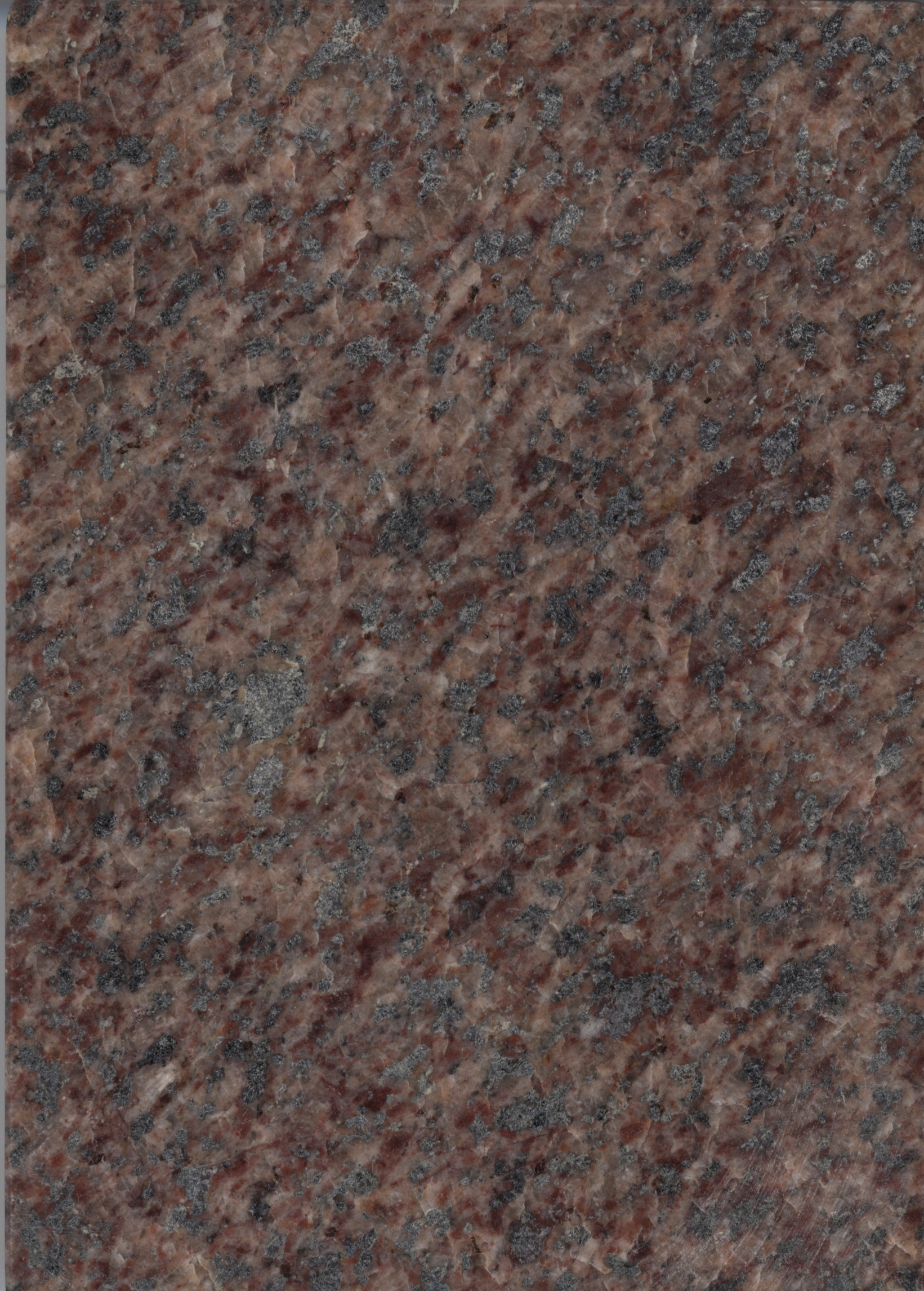 Monzonit, Plauenscher Grund, Dresden